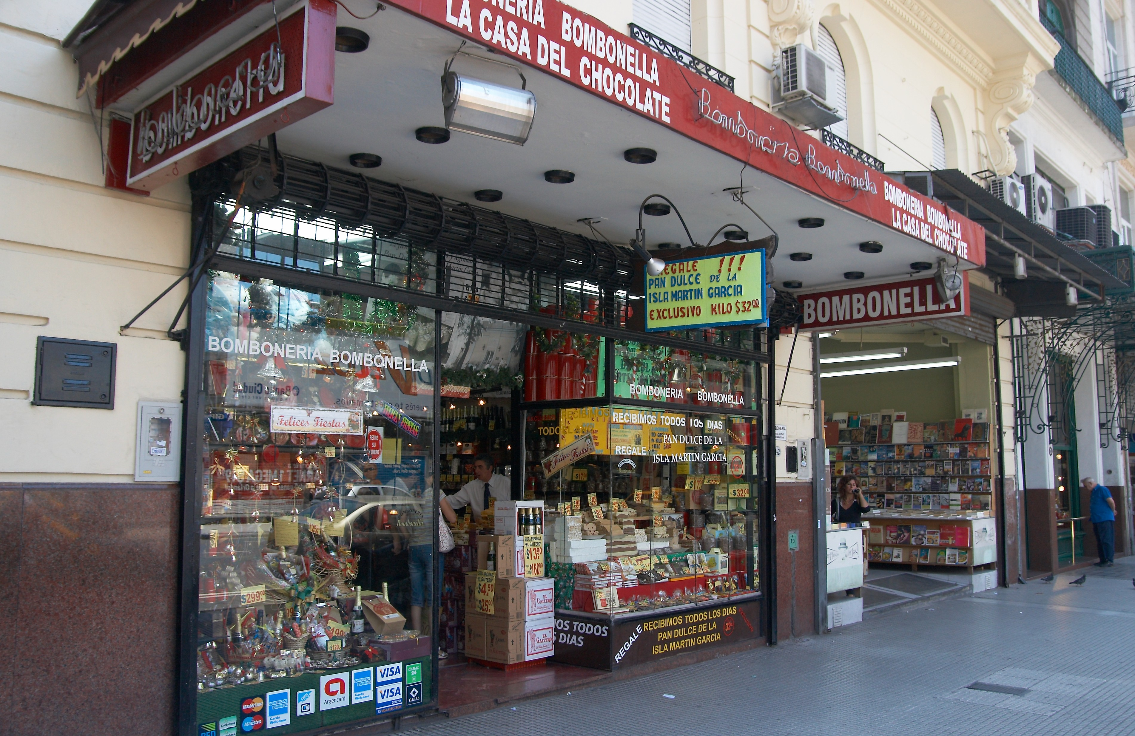 Bombonería Bombonella, Avenida Corriente entre Uruguay y Paraná, barrio de San Nicolás, Buenos Aires, Argentina.